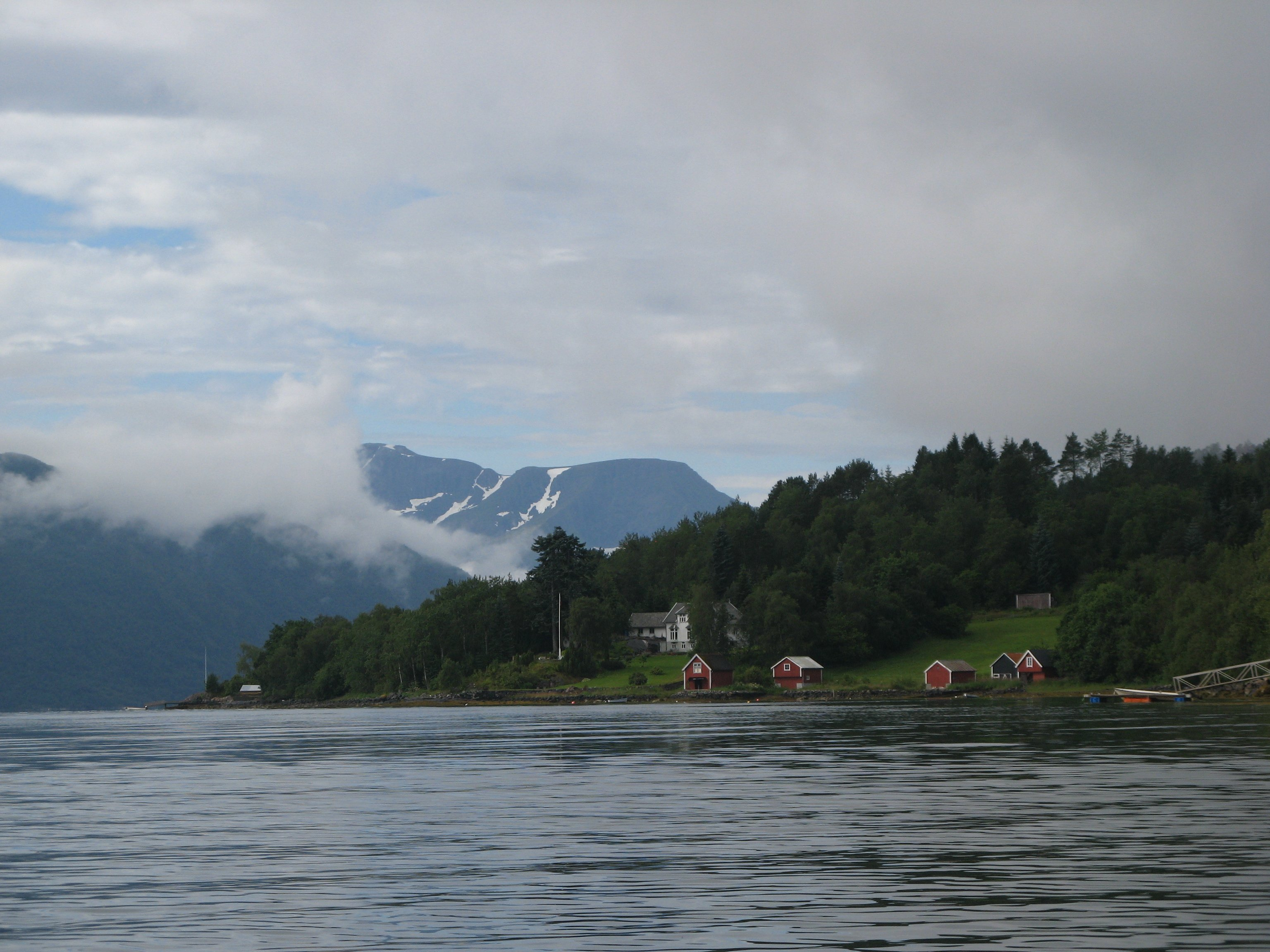 Håeimsvika in Skodje, Norway